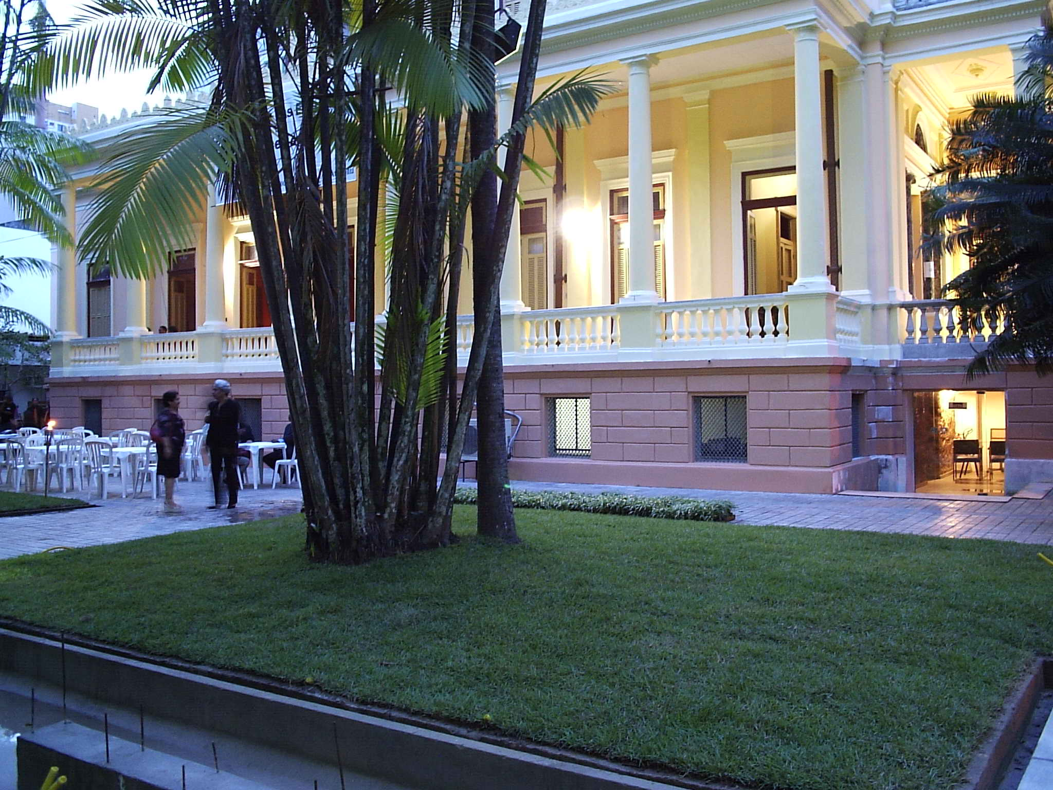 Jardim do Museu da UFPA pelo fim da tarde